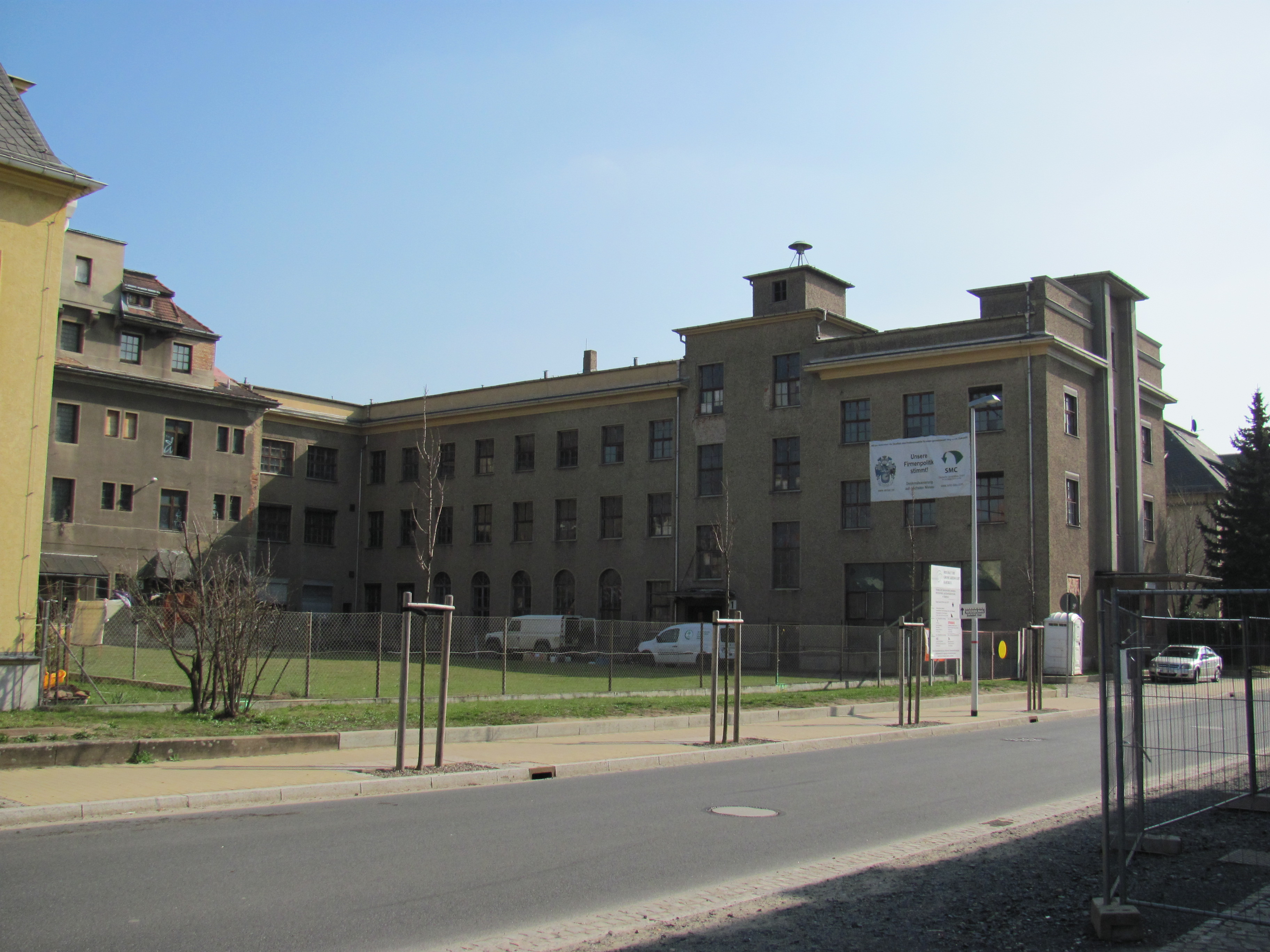 Radebeul Industriegebäude Madaus